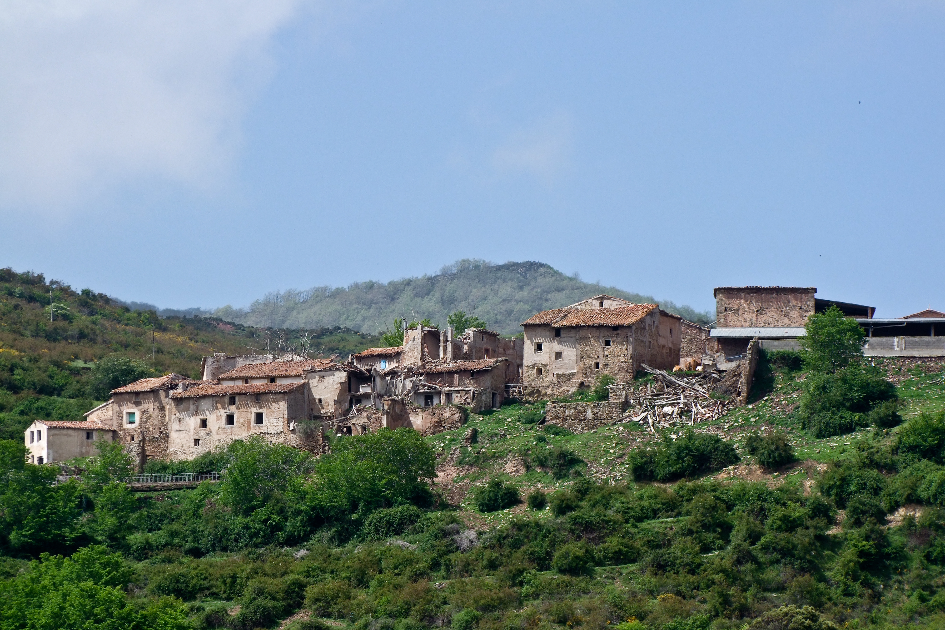 Santa Cecilia-21139.jpg